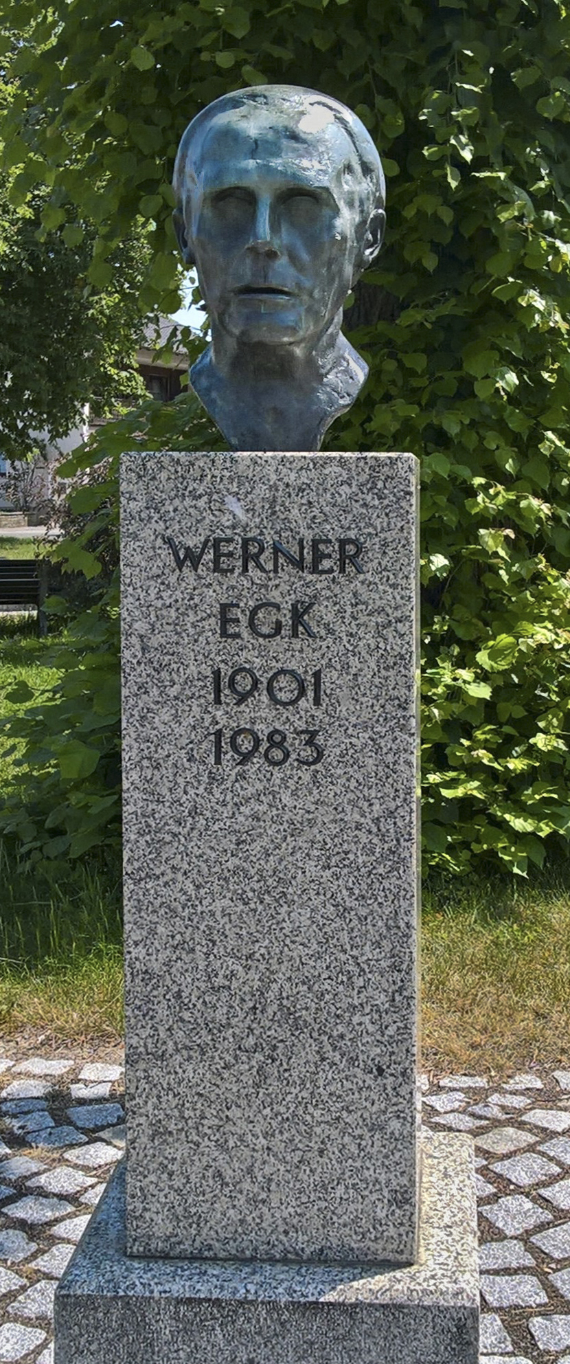 Denkmal Werner Egk , gelegen am zentralen Werner-Egk-Platz seines Geburtsortes Auchsesheim